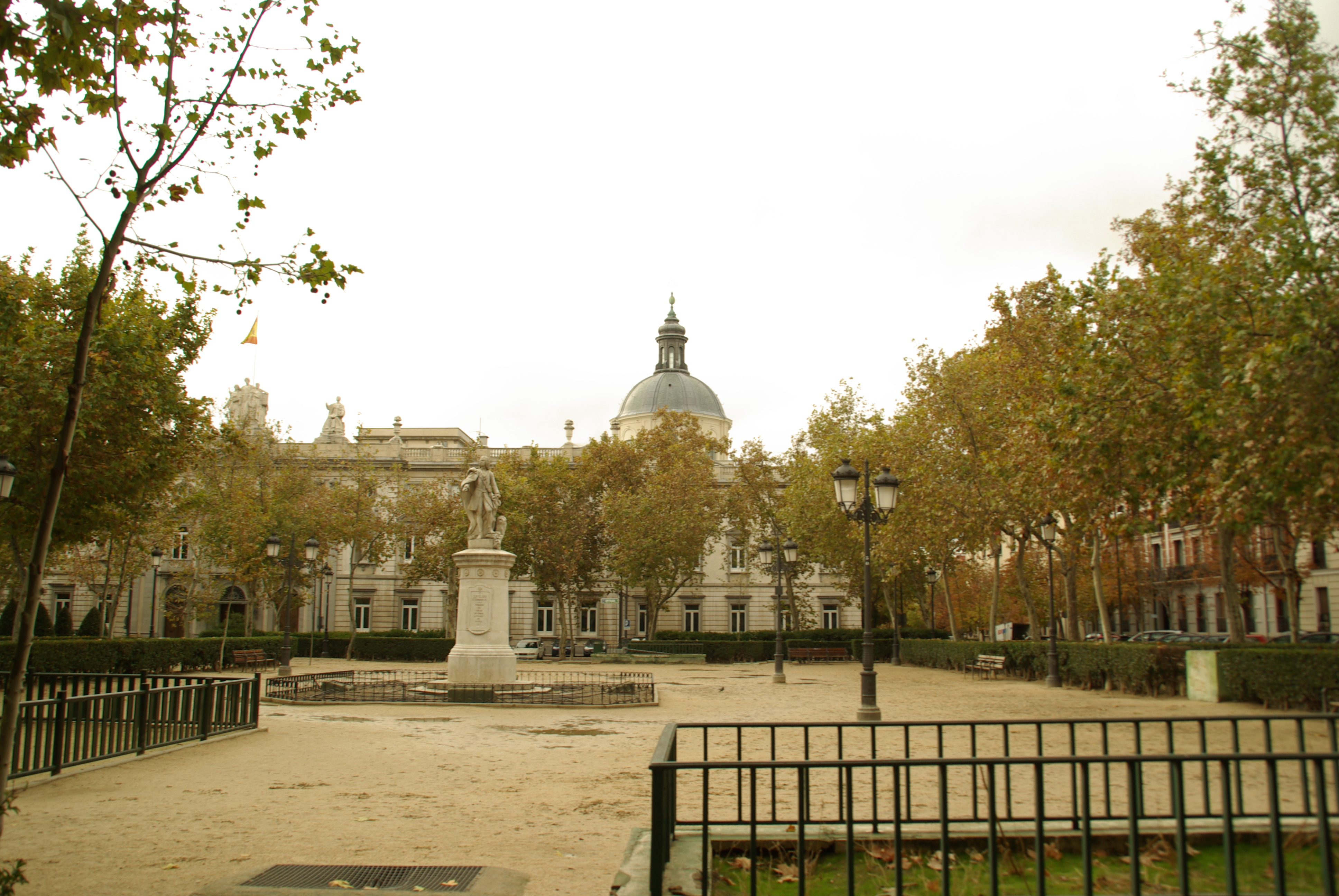 ® S.D. MADRID PLAZA DE LA VILLA DE PARIS